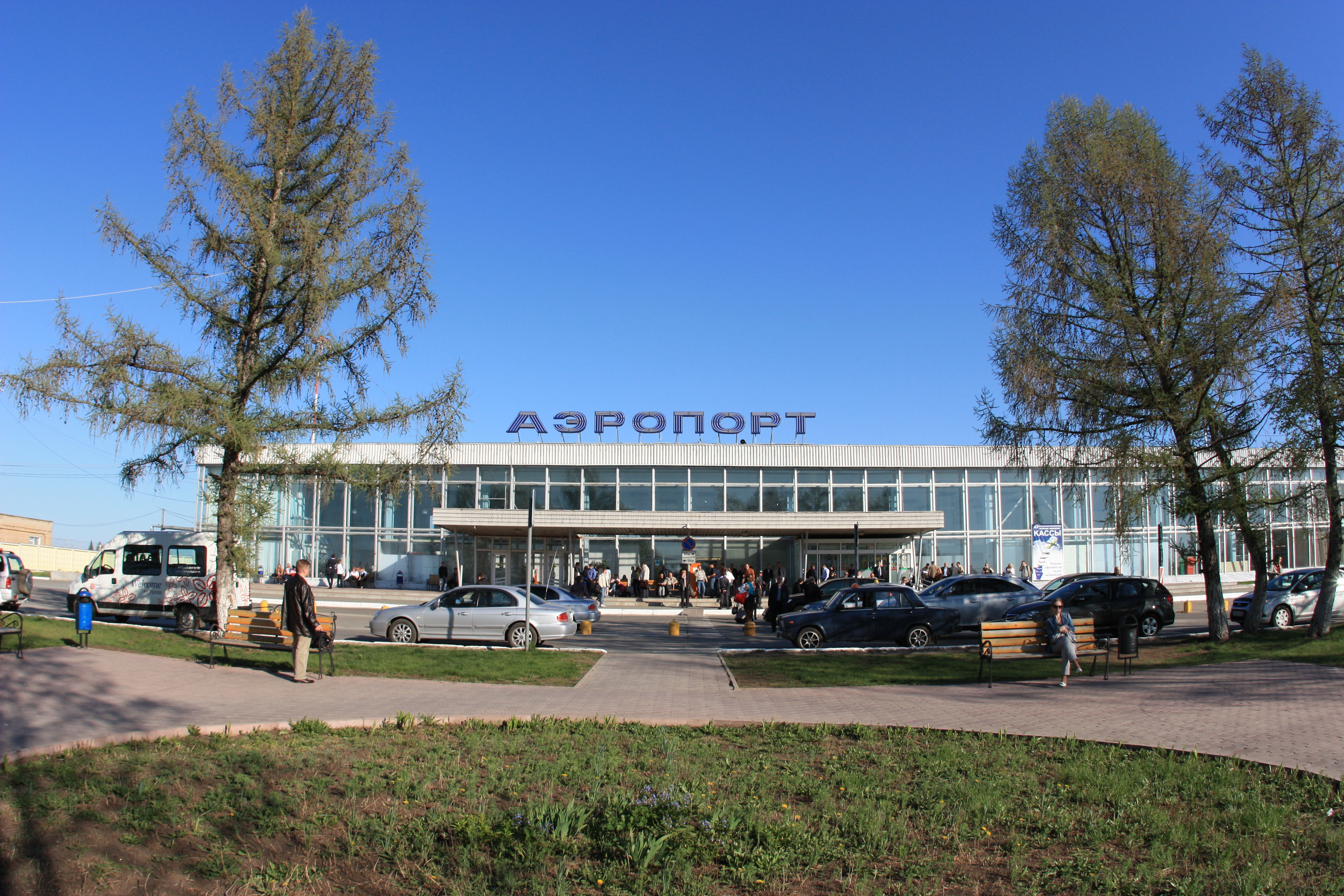 Bolshoye Savino, Permskiy kray, Russia